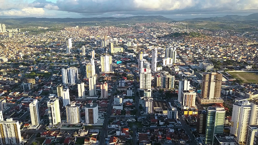 Vista aerea de Caruaru, Pernambuco, Brasil. Israel Neiva